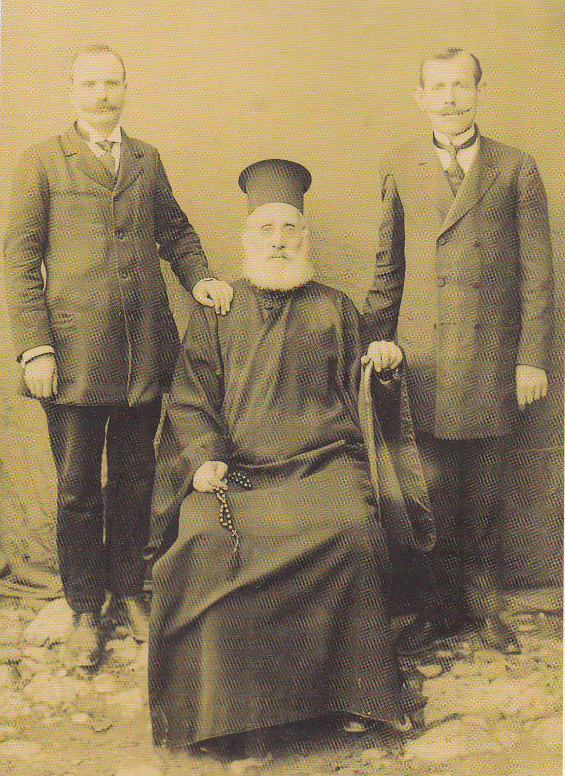 bulgarian revolutionaries